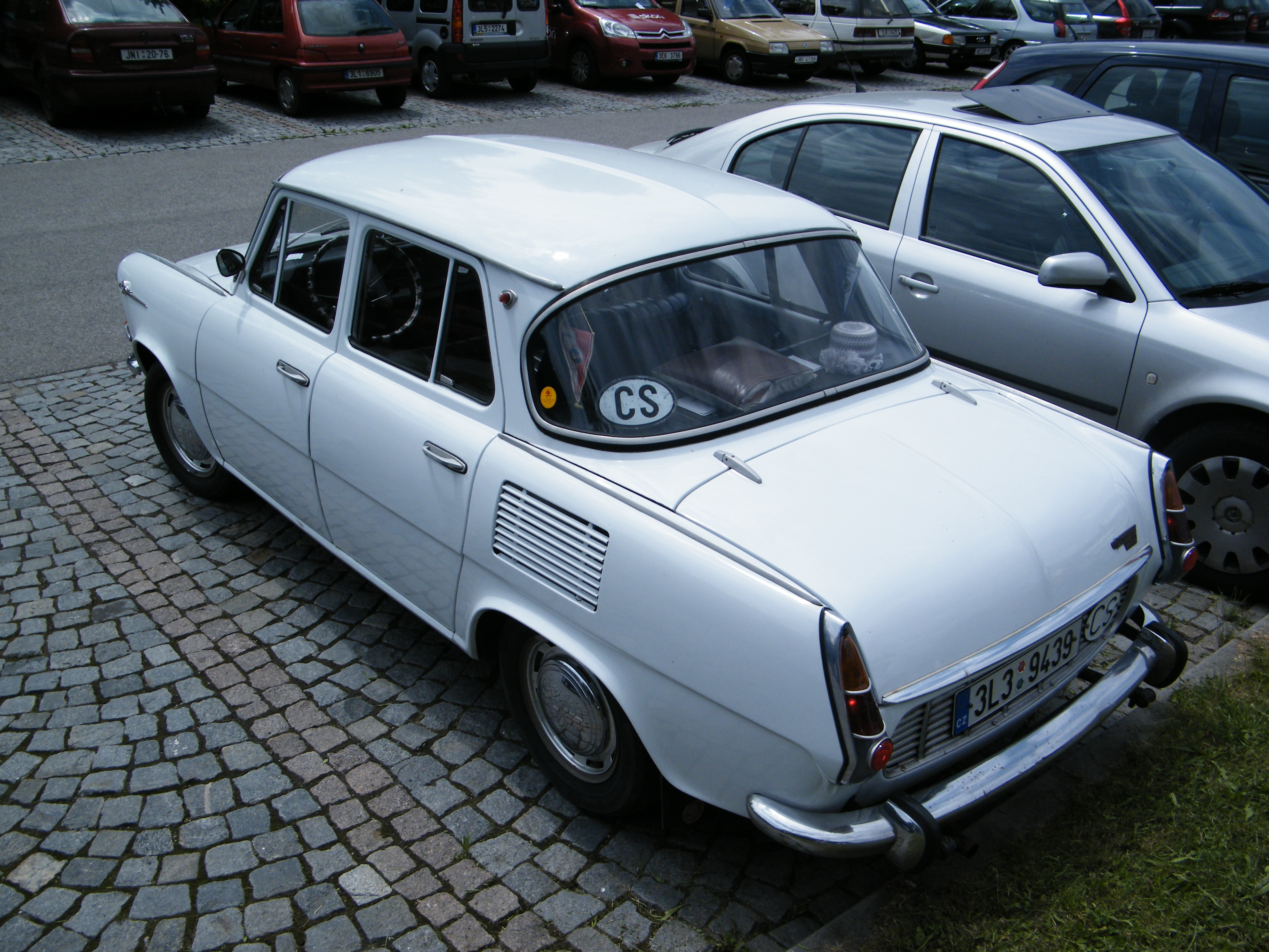 Škoda 1100 MB de Luxe Škoda 1100 MB de Luxe